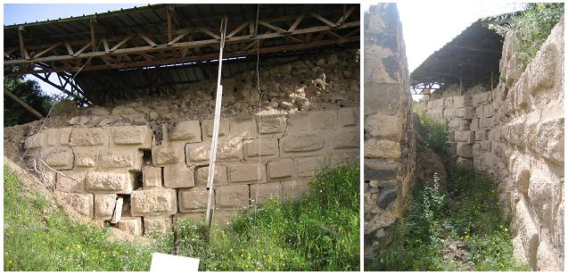 זוג תמונות של השבר הגאולוגי בחומה הצפונית של מצד עתרת. צילמתי, ערכתי והעלתי באפריל 2006. אסף.צ 22:48, 14 אפריל 2006 (UTC)